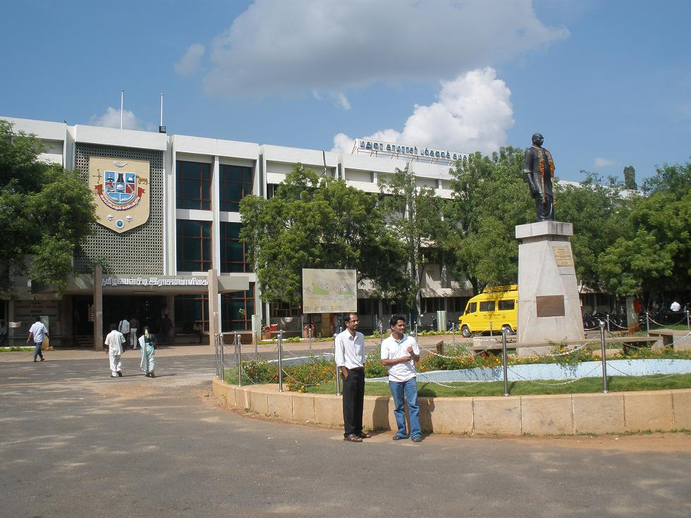 മധുരൈ കാമരാജ് സർവകലാശാലയുടെ മുൻവശം